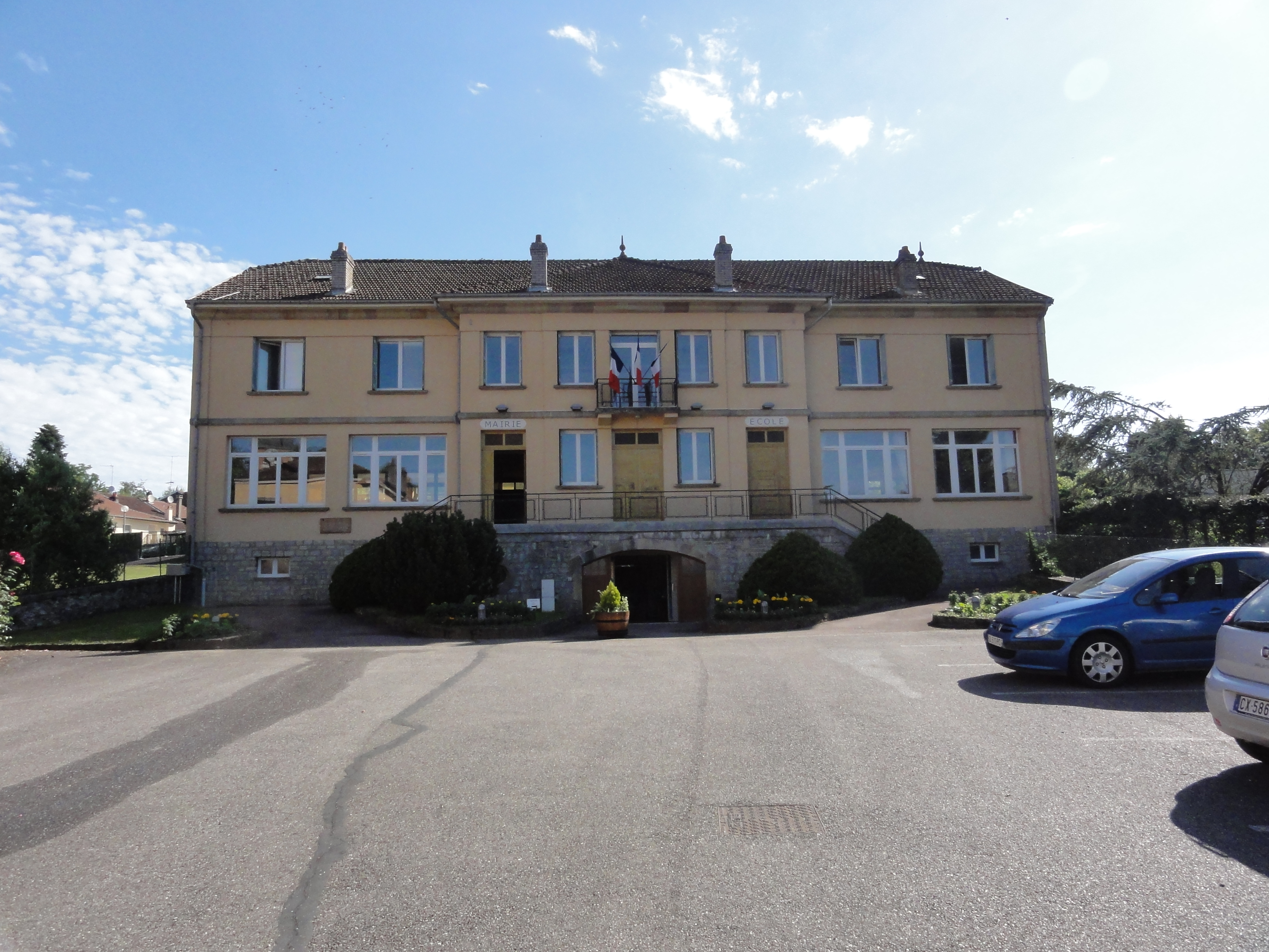 Neufmaisons (M-et-M) mairie - école